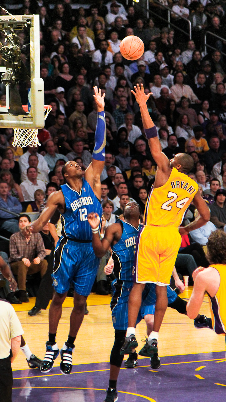 湖人对魔术，科比对霍华德。